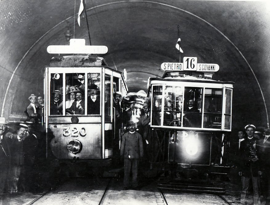 Traforo tram